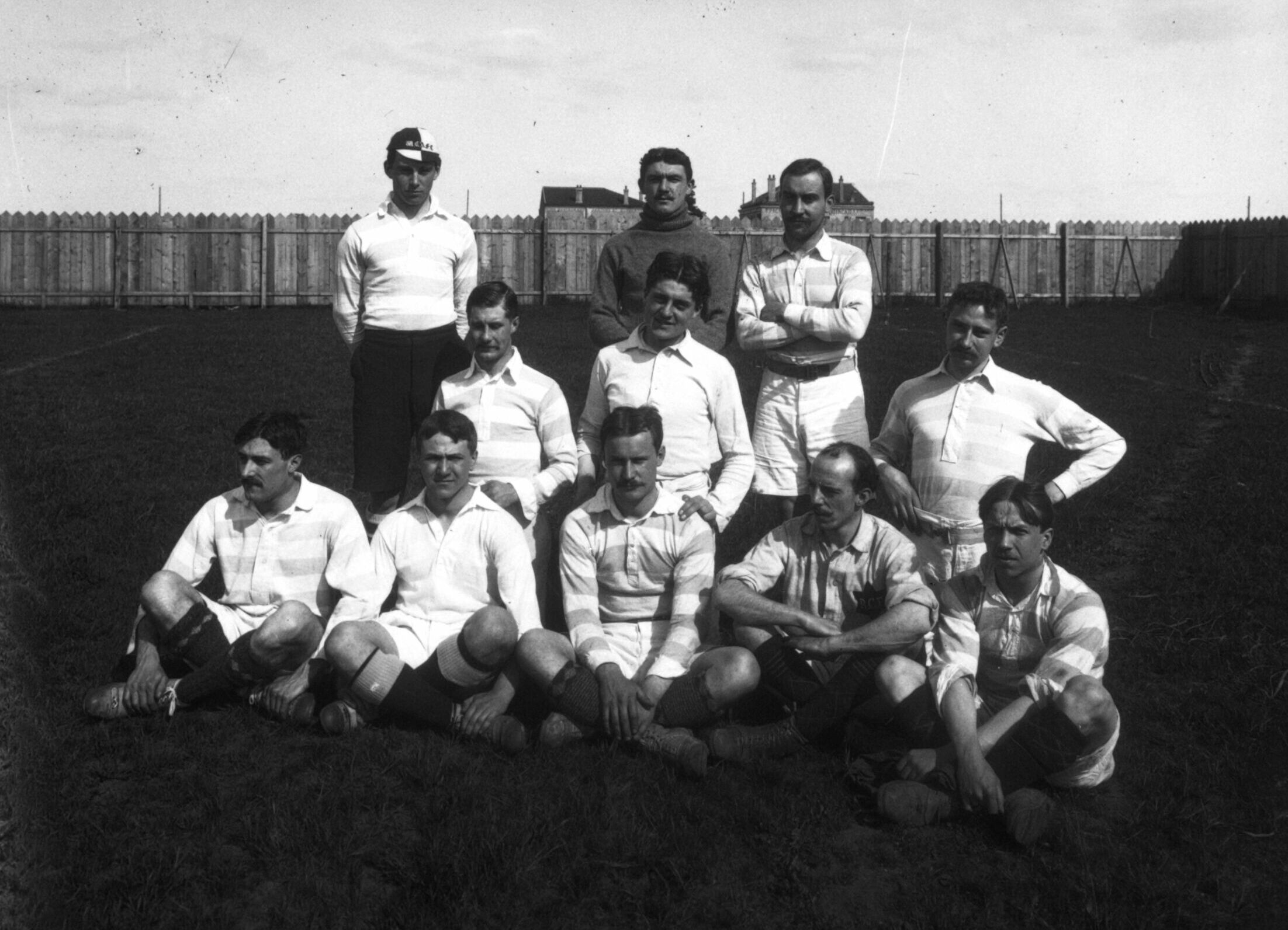 Equipe du Racing Club de France le 6 mai 1906 au stade de Charentonneau de Maison-Alfort, jour de la finale de la Coupe Dewar 1906.